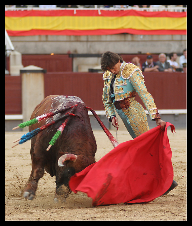 Curro Diaz